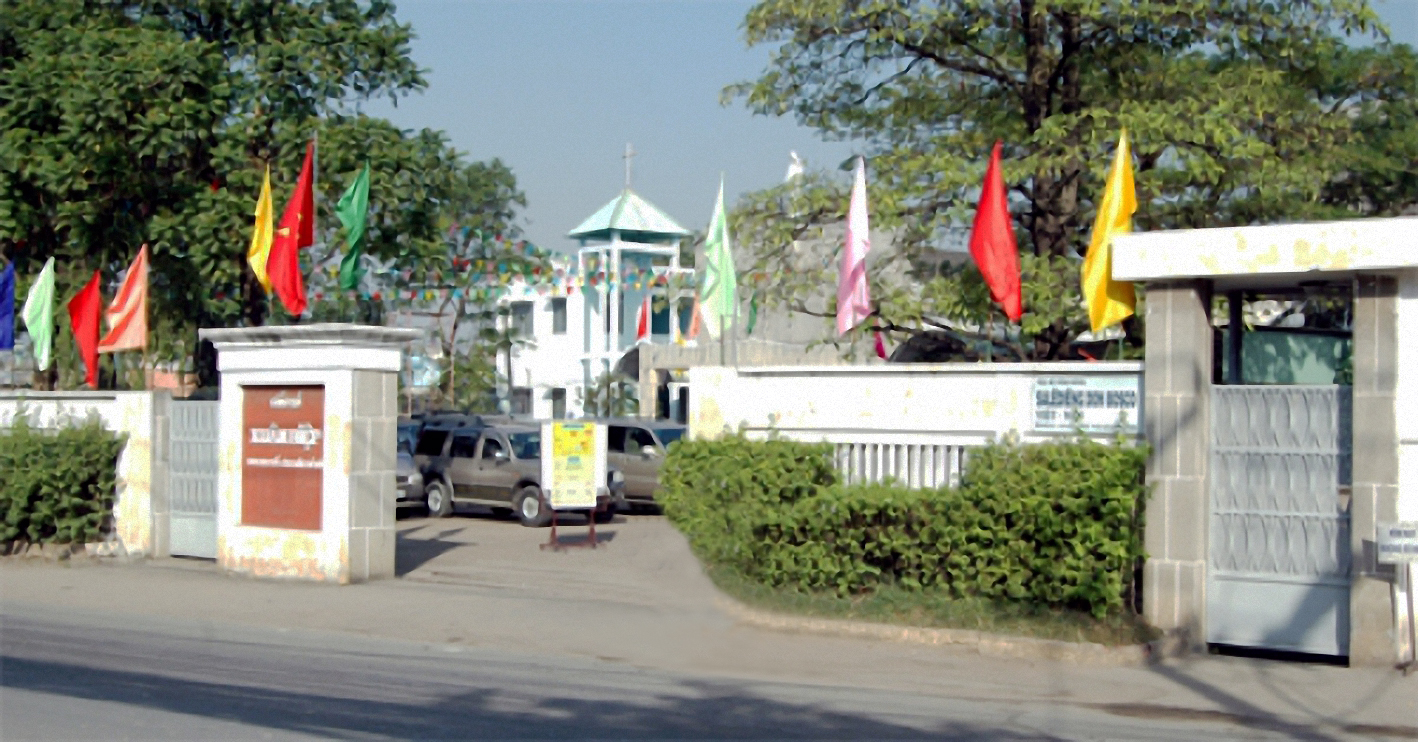 150 năm Hồng Ân Dòng Salêdiêng - Don Bosco